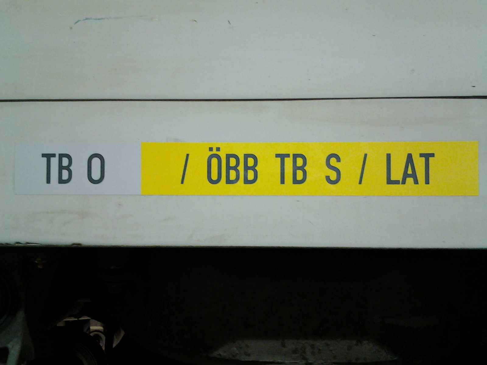 Reisezugwagen der Deutschen Bahn - Anschrift möglicher Türsteuerungsarten am Langträger